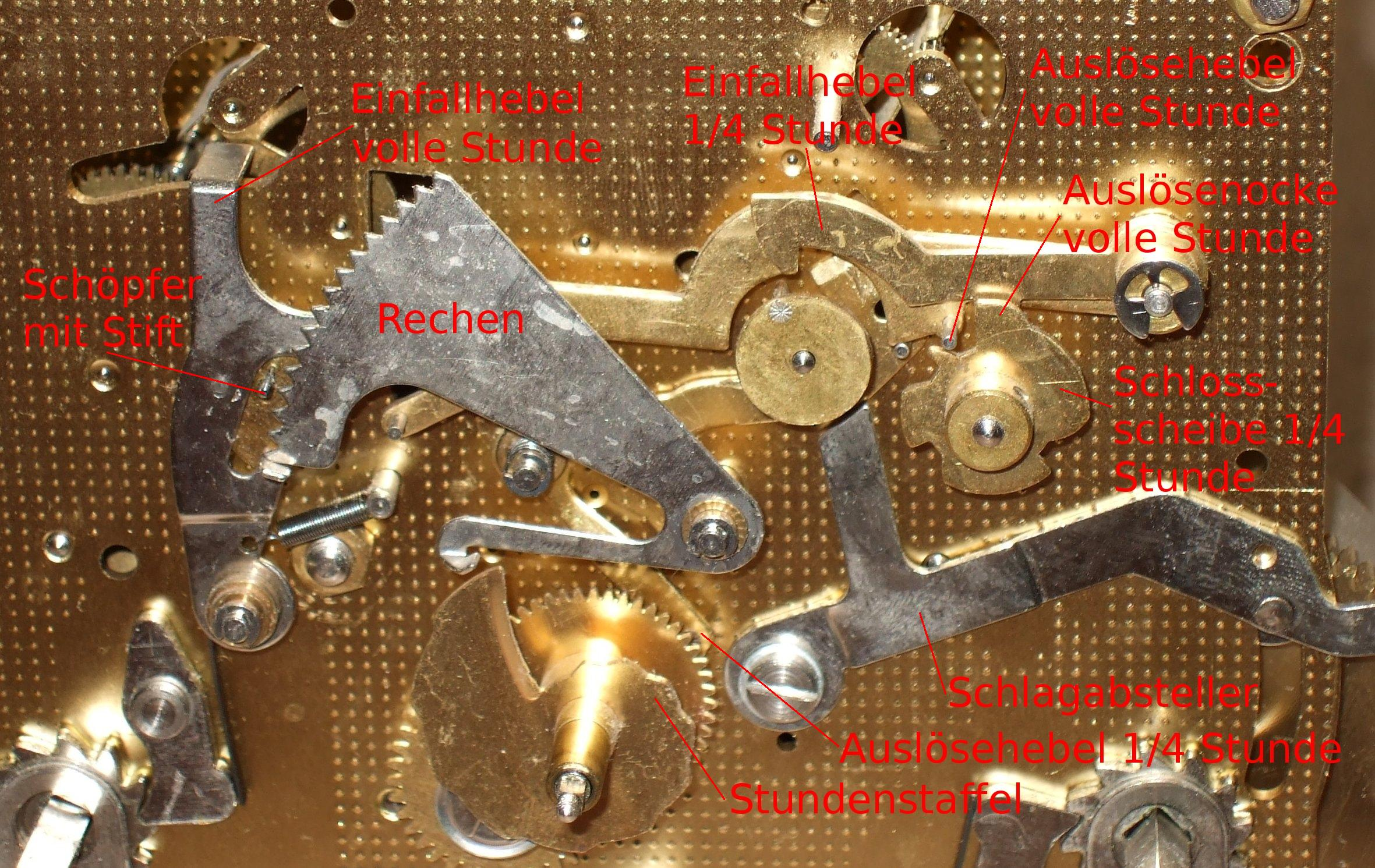 Uhrwerk von Firma FHS mit 4/4-Westminsterschlag - Ausschnitt der Ansicht von vorne mit Beschriftung der Teile des Mechanismuses